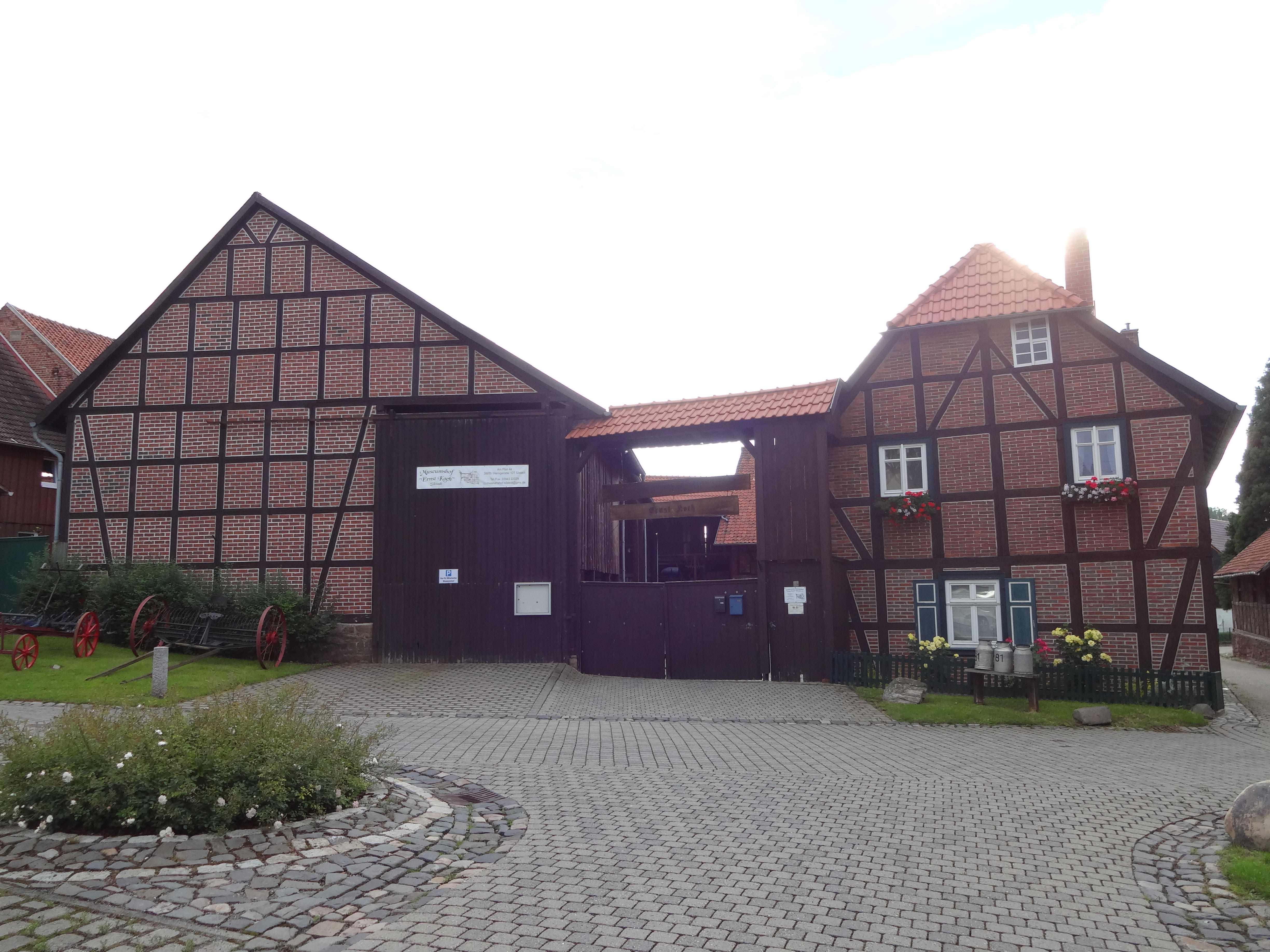 Bauernhof Am Plan 4a in Silstedt